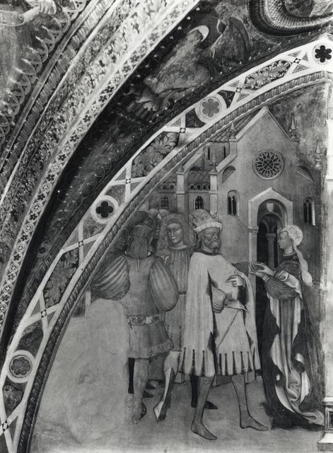 Maestro della Sagra di Carpi Disputa di santa Caterina d'Alessandria con i filosofi Affresco Chiesa di Santa Maria in Castello (Sagra) - Carpi Cappella di Santa Caterina